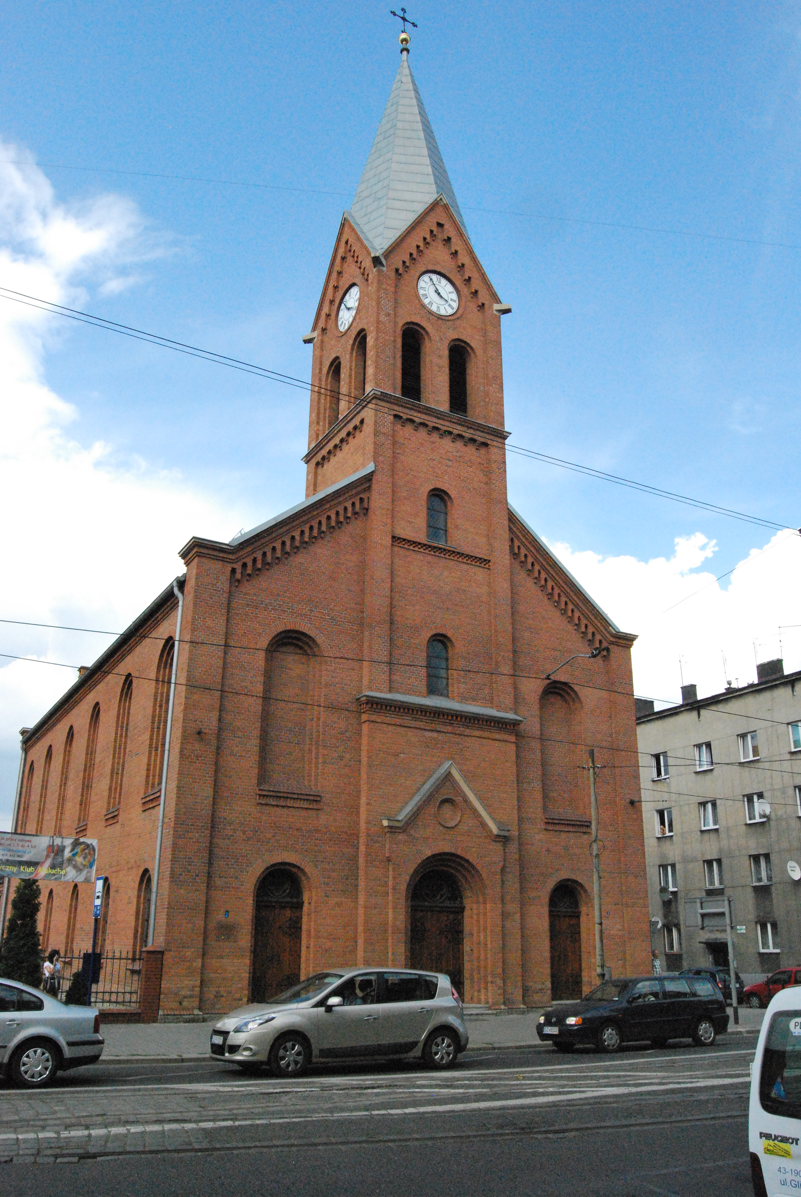 Zabrze, ul. Marcina Lutra 2 - kościół ewangelicko-augsburski im. Pokoju (zabytek nr A/150/05)